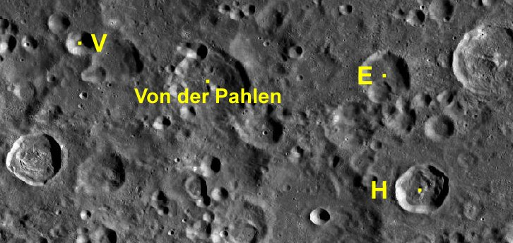 Cráter lunar von der Pahlen. Cráteres satélite. (Imagen LRO)